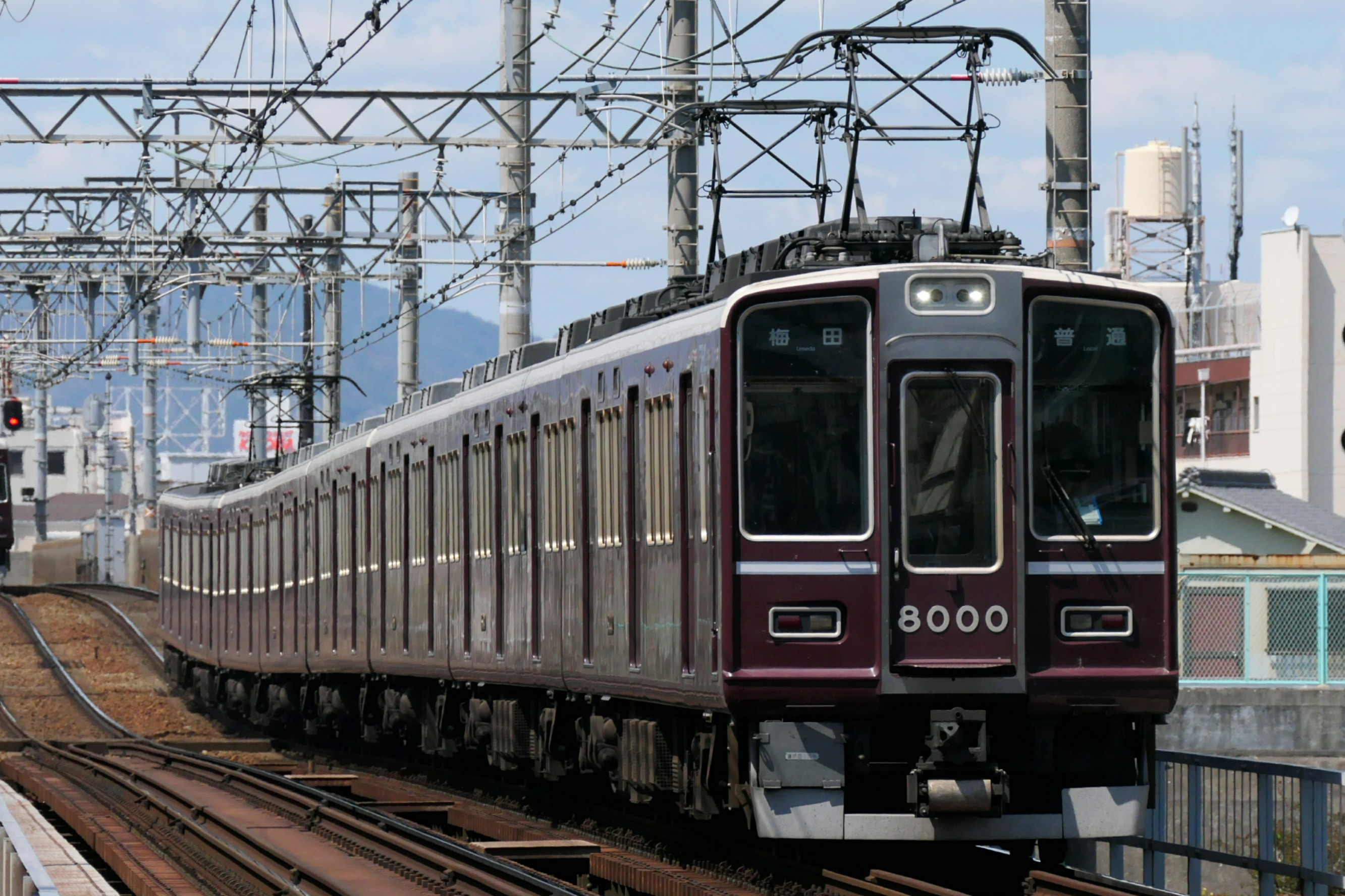 阪急電鉄8000系電車